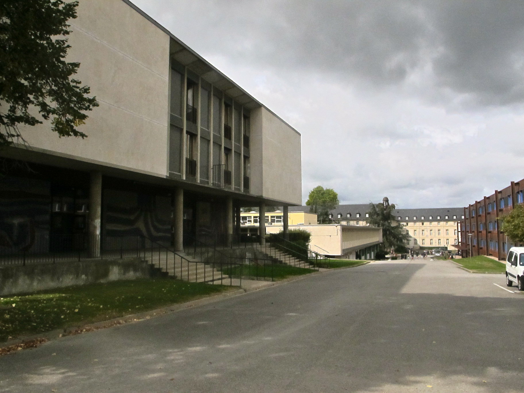 Une perspective du lycée militaire de Saint-Cyr.